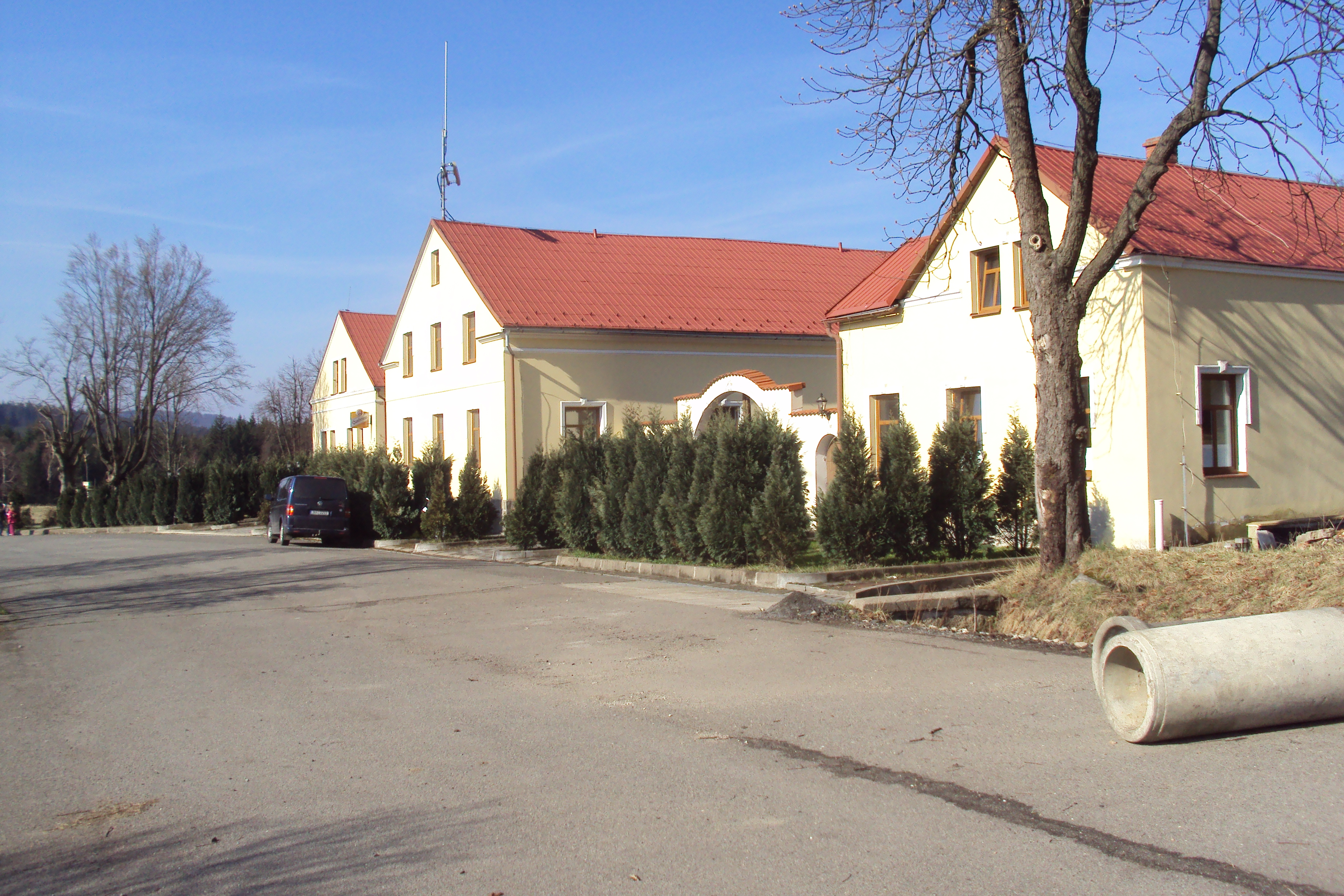 Samota Nová Huť v Lužických horách na turistické trase E10